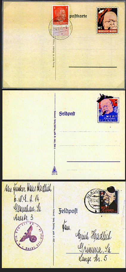 Propagandapostkarten, hergestellt in Deutschland, die Winston Churchill ins Lächerliche ziehen sollten.